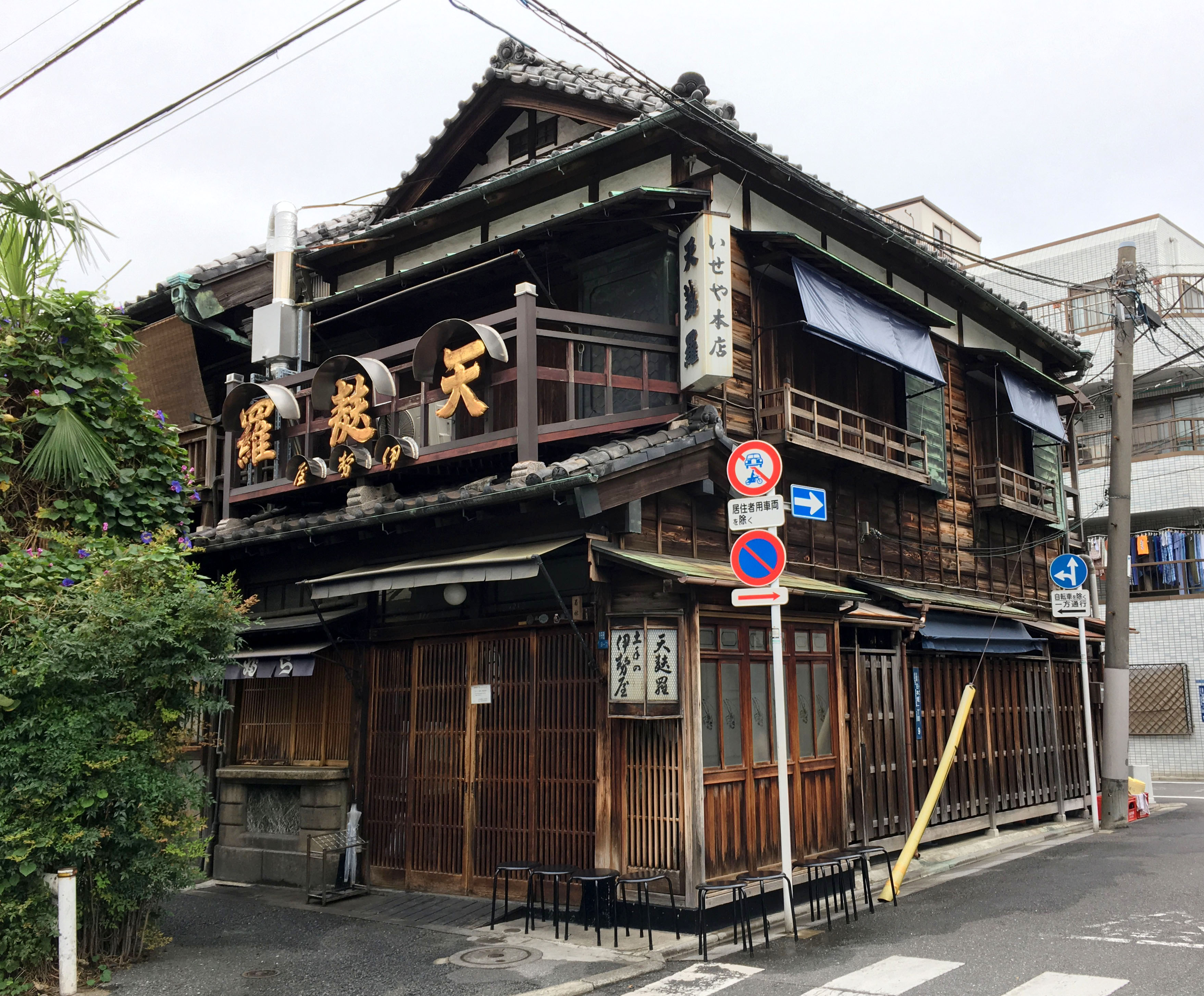 土手の伊勢屋（開店30分前なので暖簾が出ていない）